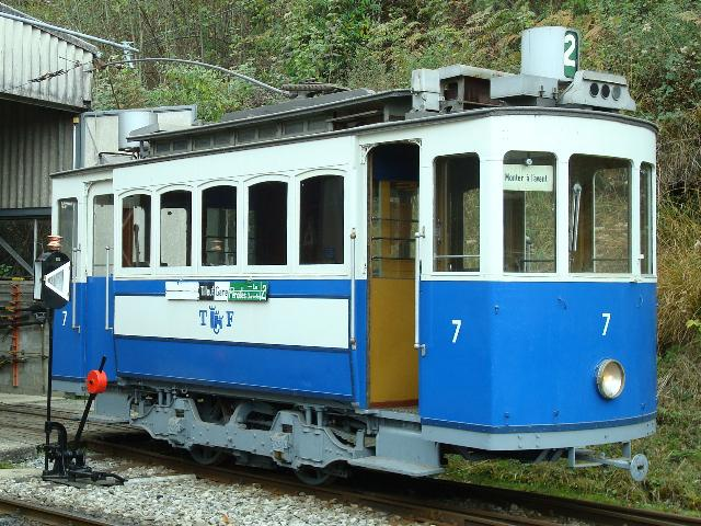 Selten am Tageslicht. Strassenbahn Motorwagen Ce 2/2 7 aus Freiburg im Üechtland (Schweiz) im Oktober 2008 auf dem Areal der Museumsbahn Blonay-Chamby (BC) in Chaulin.